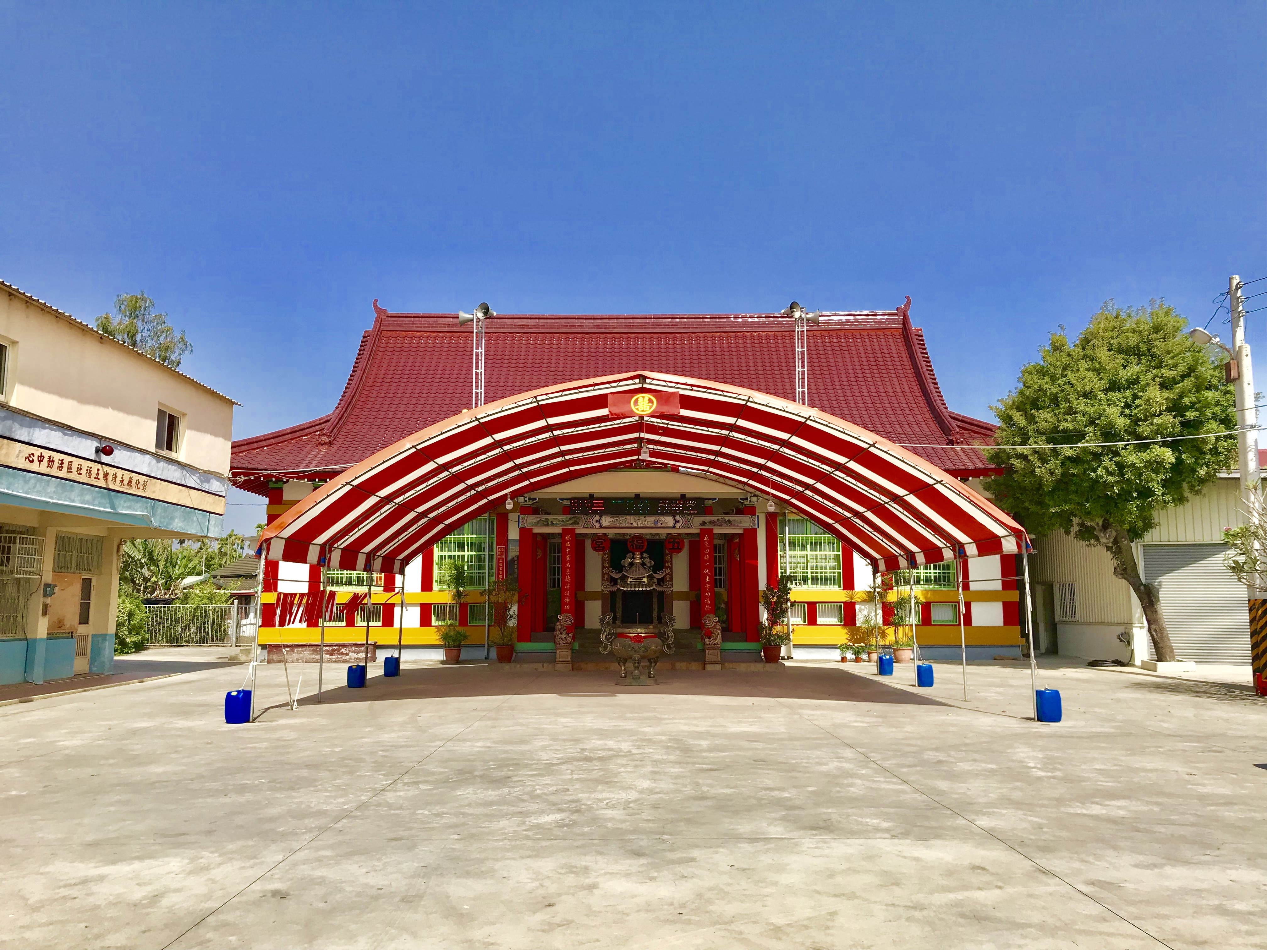 中文（台灣）: 搭棚的永靖五福宮。